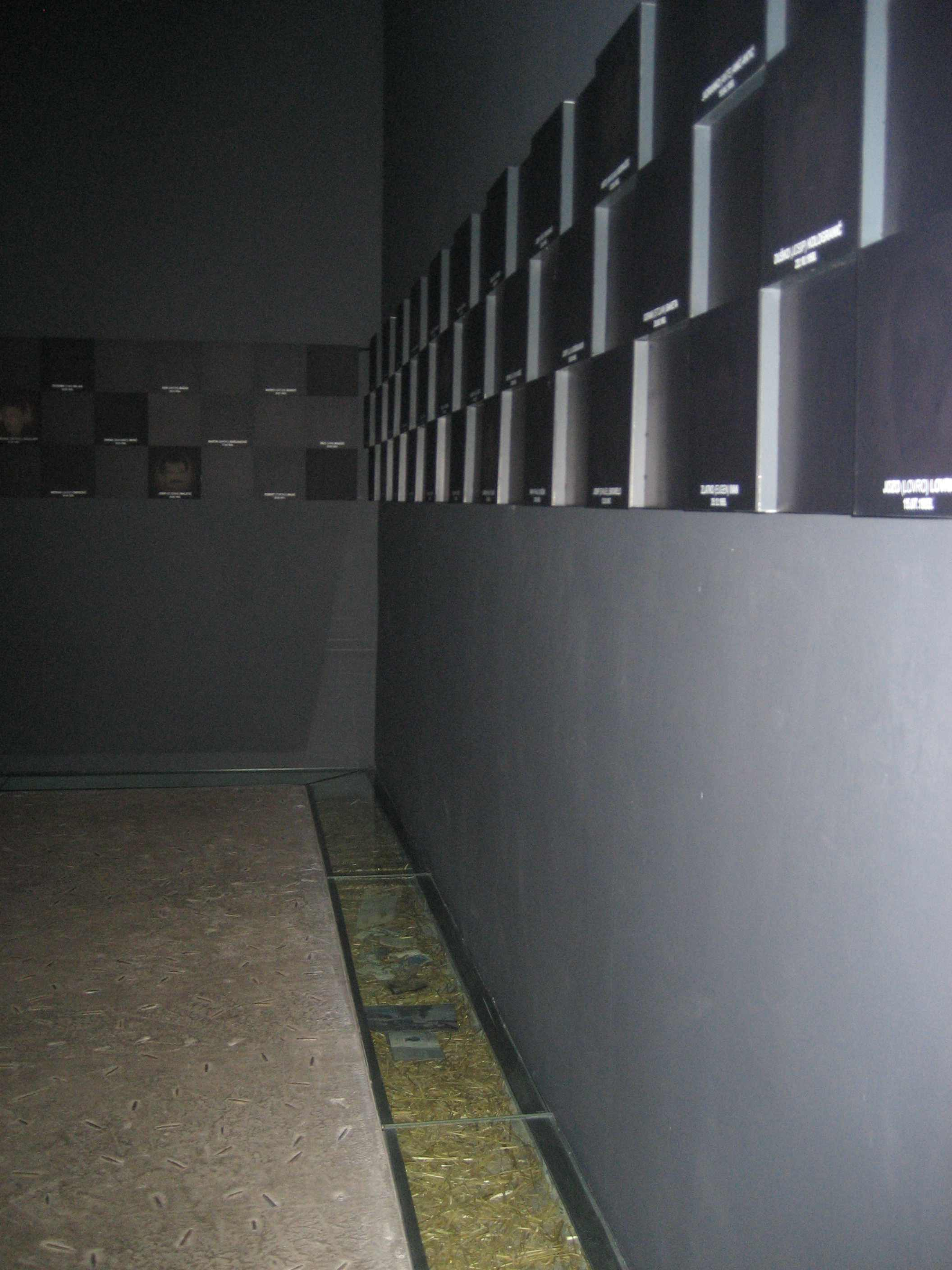 Ovcara Massacre Memorial-2